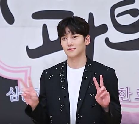 [TV텐] 5월 10일 드라마 '수상한 파트너' 제작발표회 현장